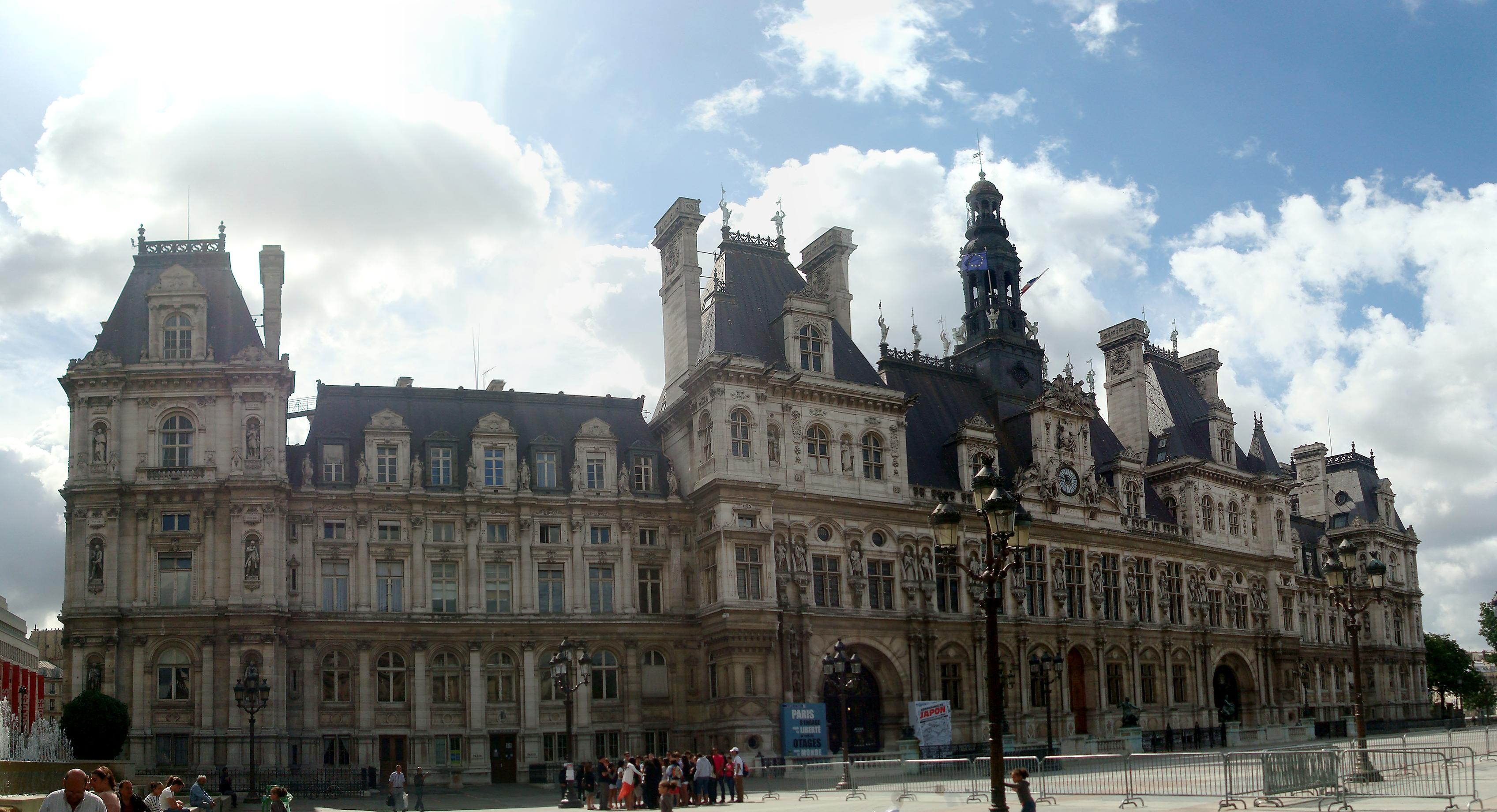 Hotel de Ville Paris Sujet: Hôtel de Ville de Paris pendant l'opération Paris-Plage Date de la prise de vue: août 2004 WP: "(suppr) (actu) 12 aoû 2004 à 10:32 . . Pol (318530 octets) (Photo libre de droits de l'Hôtel de ville de Paris)"